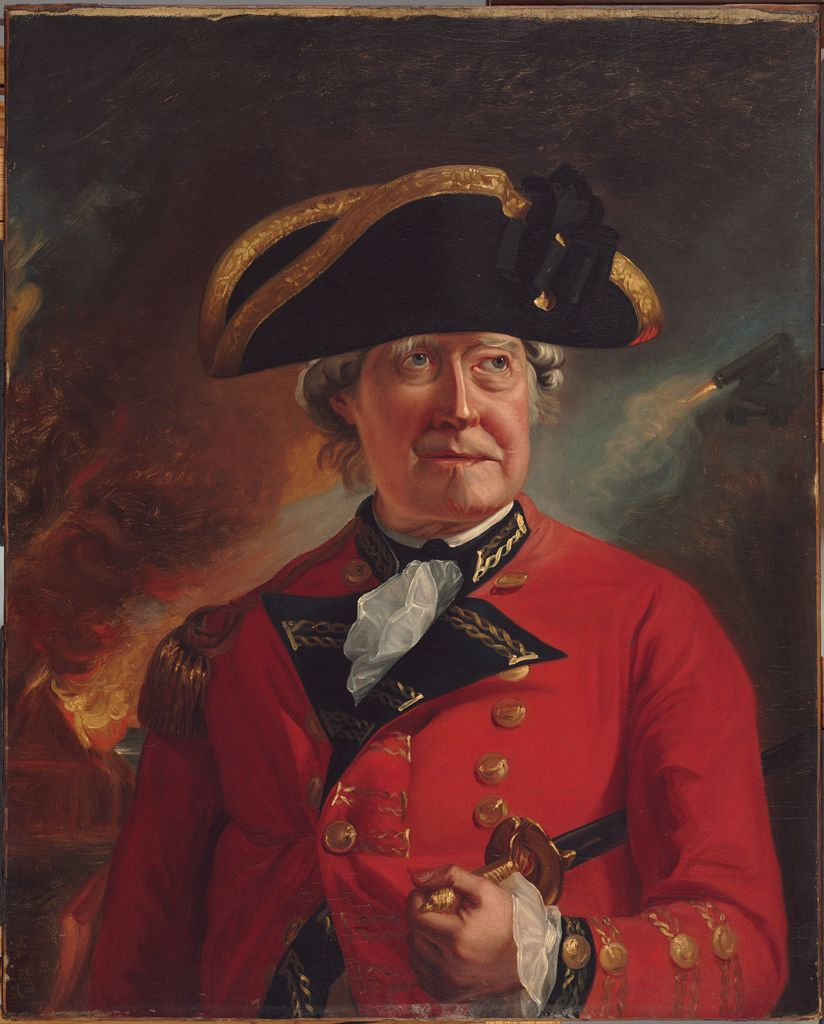 August de la Motte (* 17. November 1713; † 29. August 1788 in Verden) war ein Kur-Braunschweigischer-Lüneburgischer Generalleutnant und wurde bekannt bei der Verteidigung von Gibraltar in den Jahren 1779 bis 1783.Öl auf Leinwand 76.5 x 61.9 cm